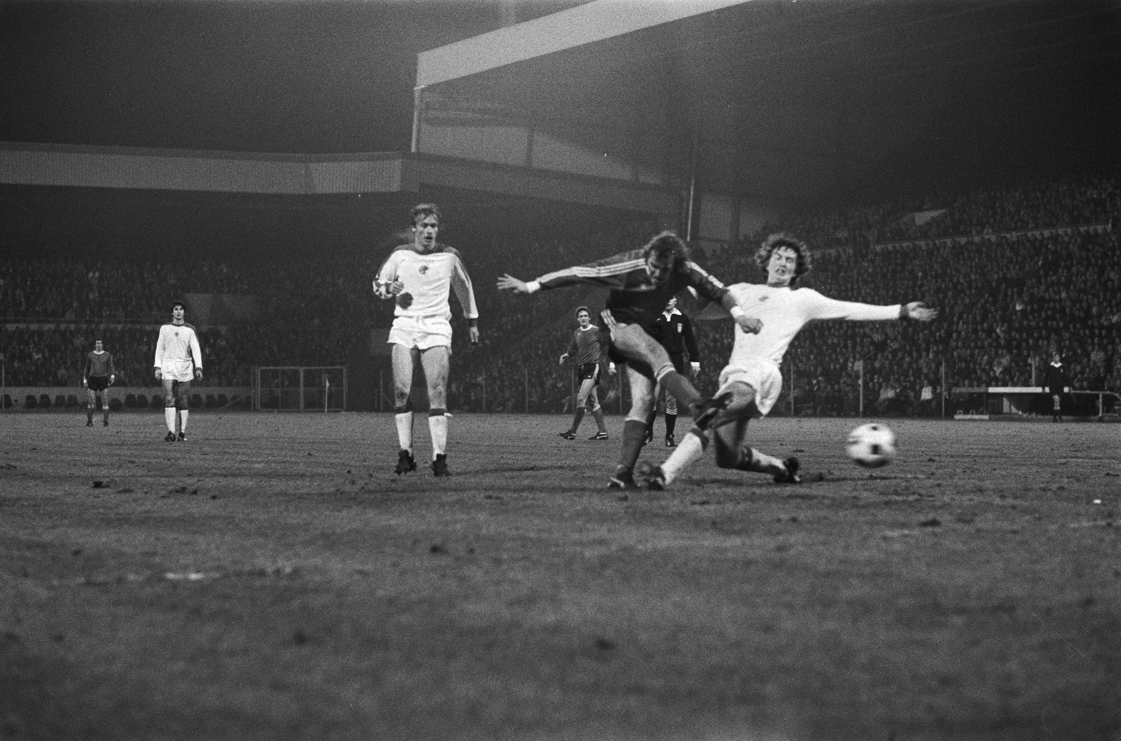 Match de football PSV - Ajax (3-1) à Eindhoven, René van de Kerkhof (au centre) ouvre le score malgré Wim Meutstege (à droite) et Dick Schoenaker (à gauche). Photographie par Koen Suyk / Anefo.